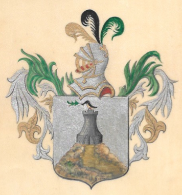 Blasón concedido por SM El Rey Carlos II de España a José Francisco Antonio de Oriol y de Montagut